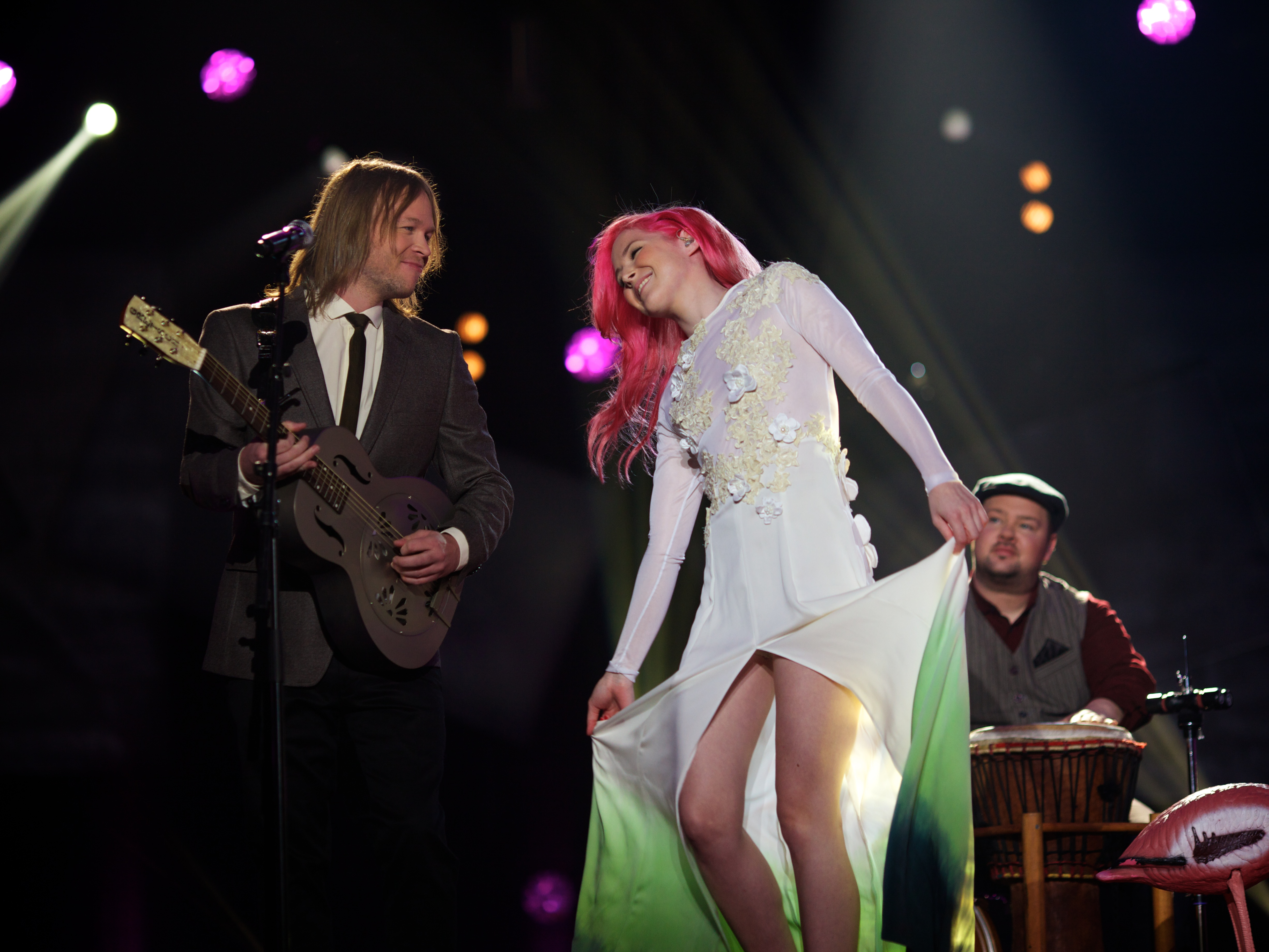 Melodi Grand Prix 2013 delfinale i Larvik